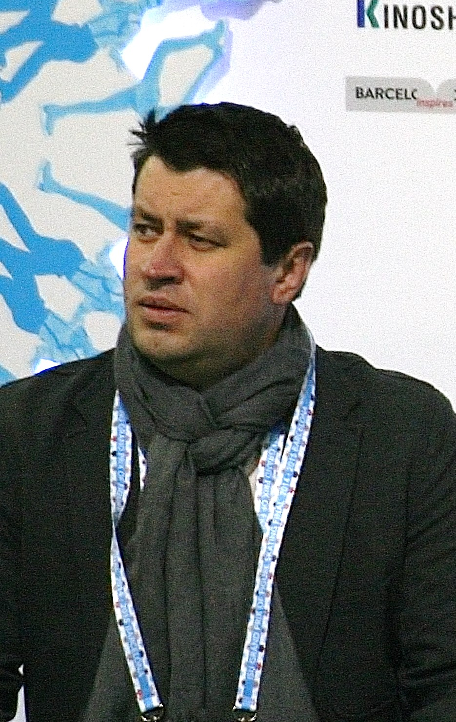 Юрий Разгуляев на финале Гран-при среди юниоров 2014-2015.